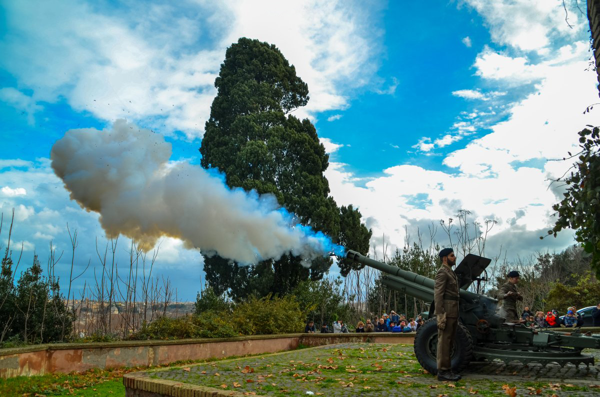 Spara tutti i giorni alle 12 precsio